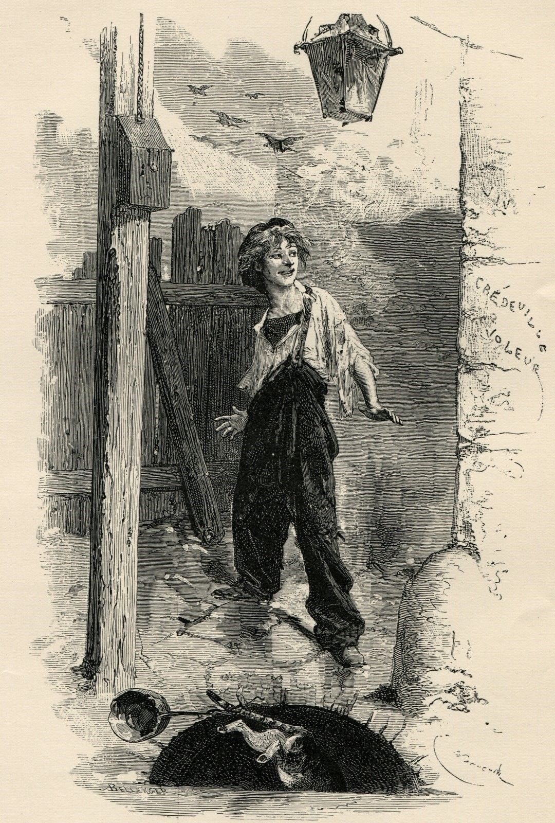 Gavroche, character by Les Misérables